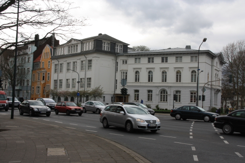 Die heutige Musikschule in Düren